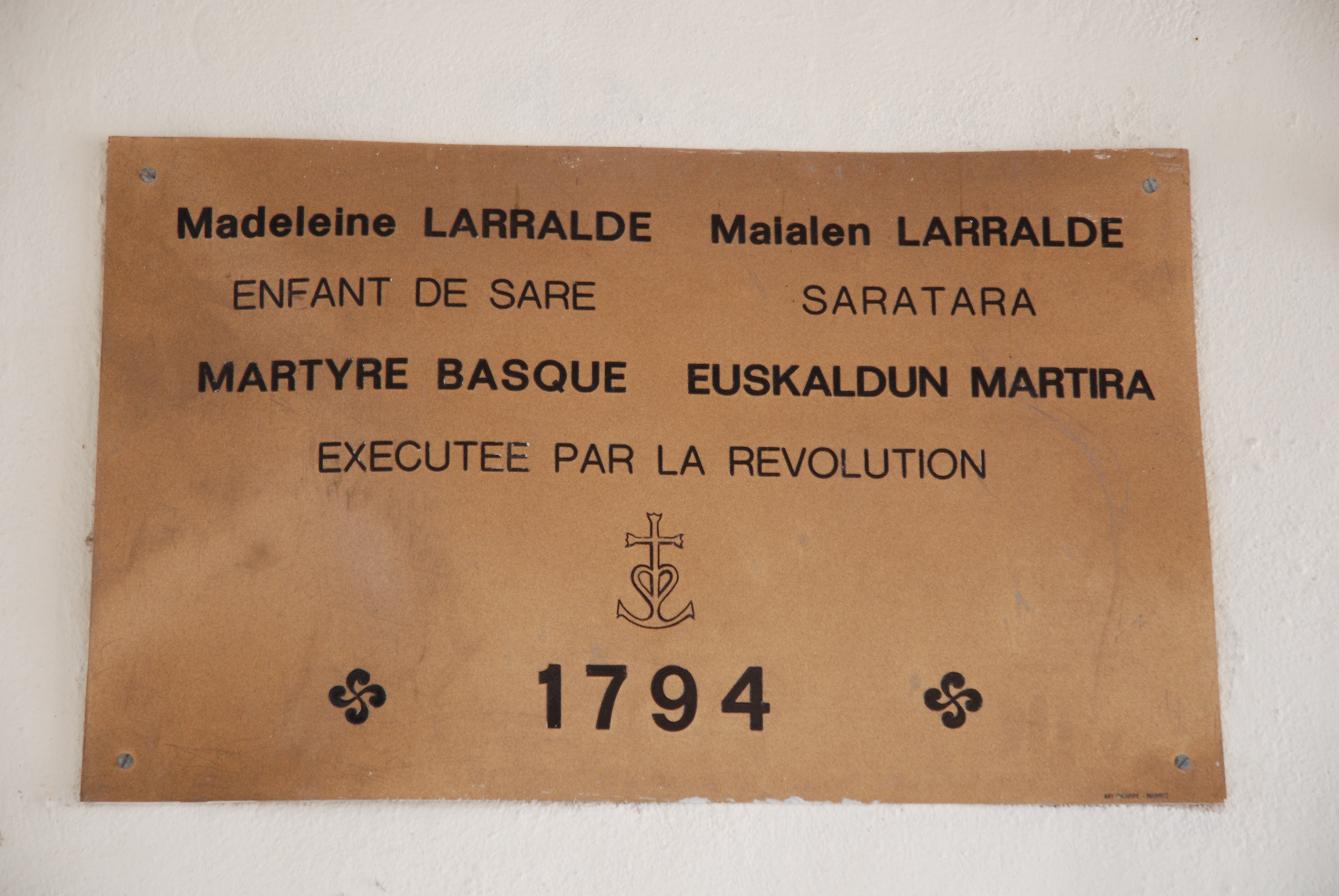 Oroimen plaka Sarako Jondoni Martineko elizatean